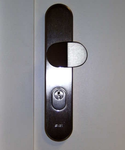 Schutzbeschlag, Germany.